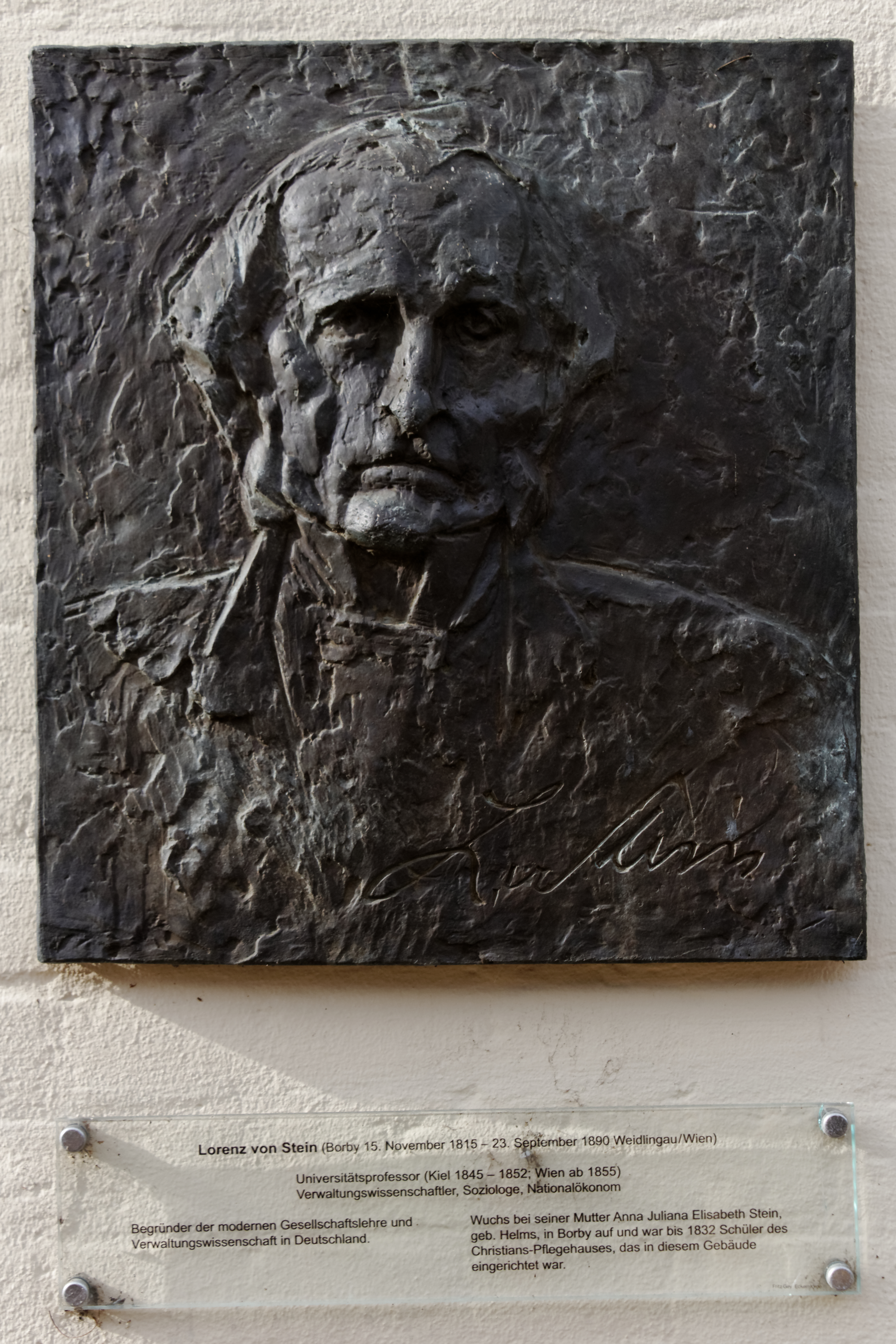 Bronzerelief des Lorenz von Stein am Hause Kieler Str. 98-100 in Eckernförde